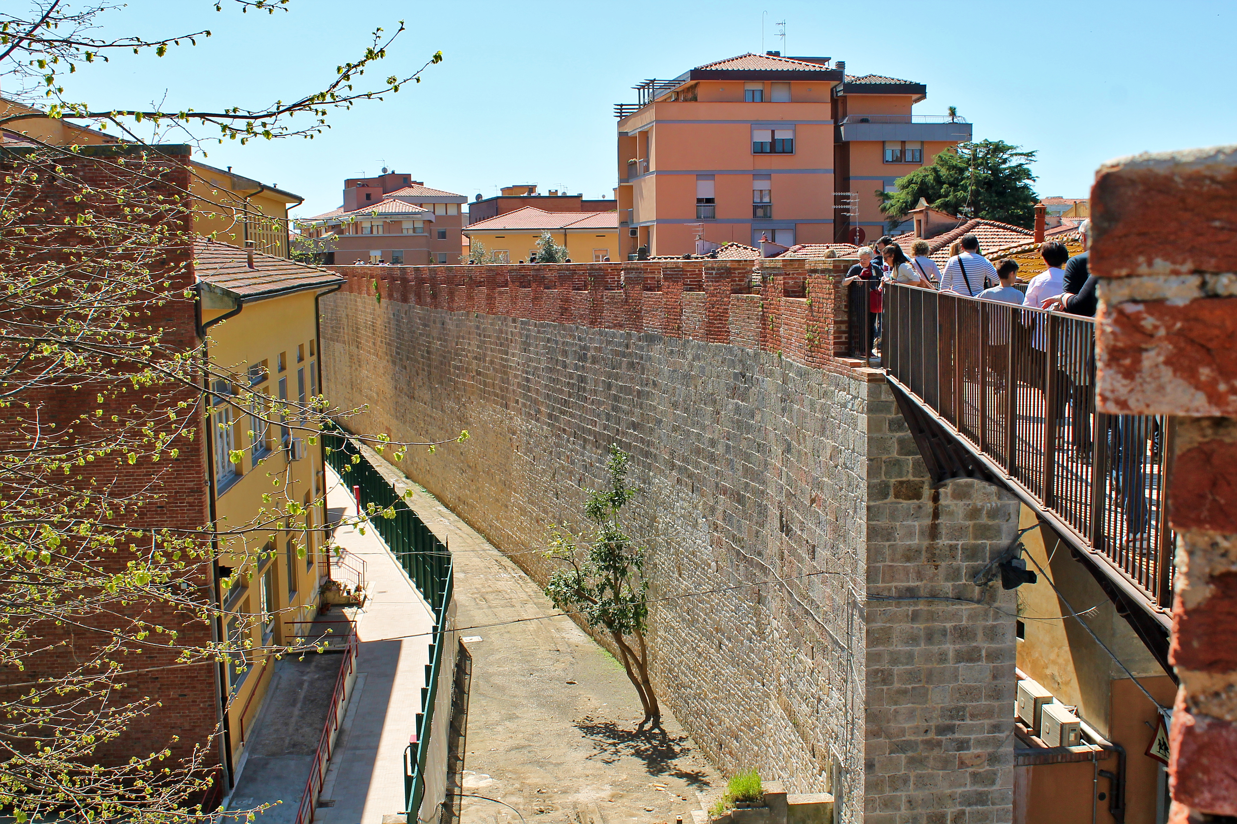 Mura di Pisa, viste da sopra via San Francesco